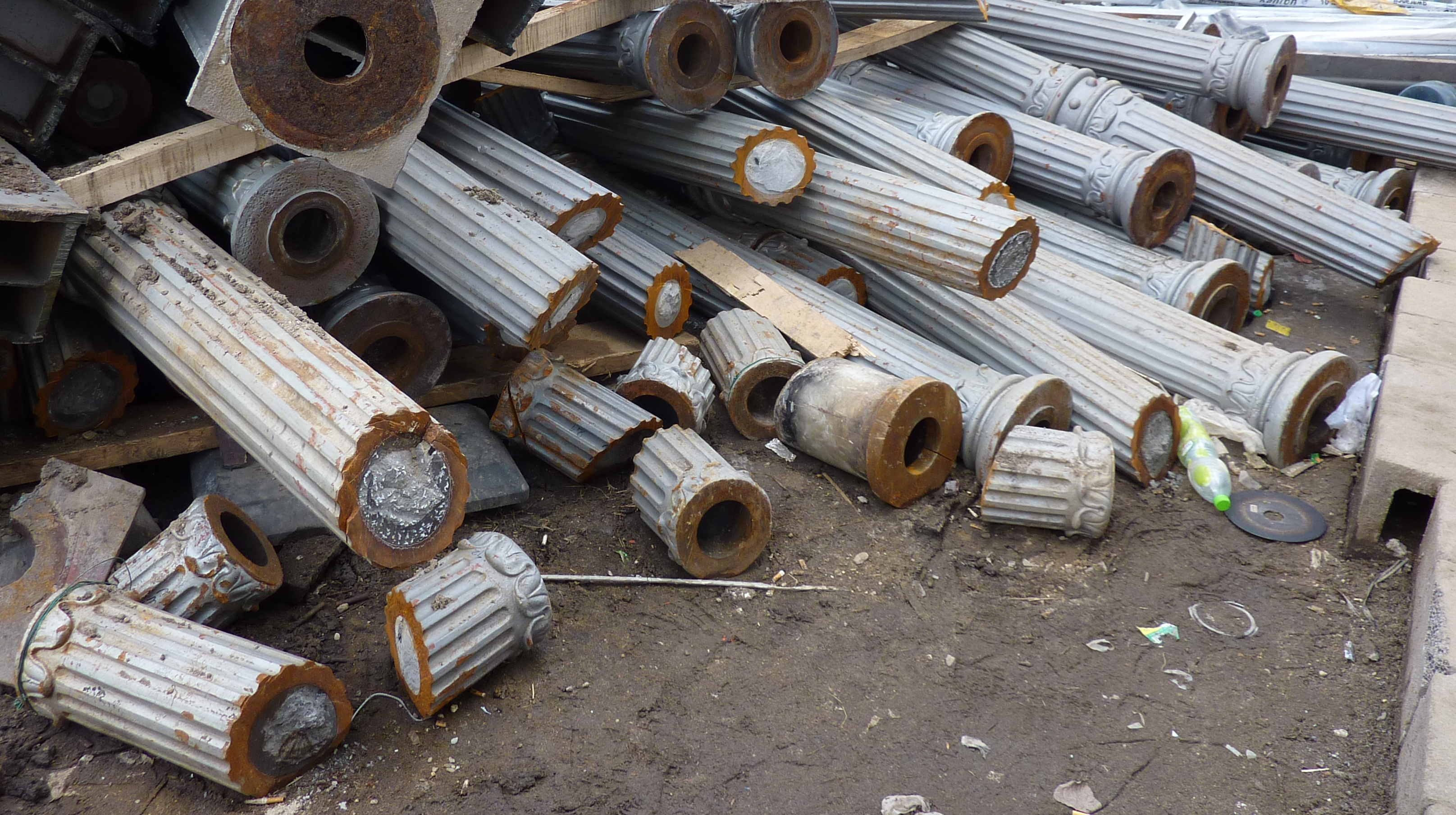 Składowisko starych zdemontowanych w lutym 2010 roku kolumn Hartunga, które przez ponad sto lat podtrzymywały wiadukty kolejowe nad ul. Zielińskiego, Stysia, Zaporoskiej i k. pl. Rozjezdnego we Wrocławiu. We wnętrzu niektórych z nich widoczny jest wypełniający je beton, który wlano tam podczas remontu przeprowadzonego jesienią 2009 i który – w zamierzeniu mając zwiększyć wytrzymałość słupów na obciążenie – w rzeczywistości po przyjściu pierwszych mrozów w grudniu 2009 spowodował popękanie niektórych z nich i w rezultacie konieczność wymiany ich wszystkich.